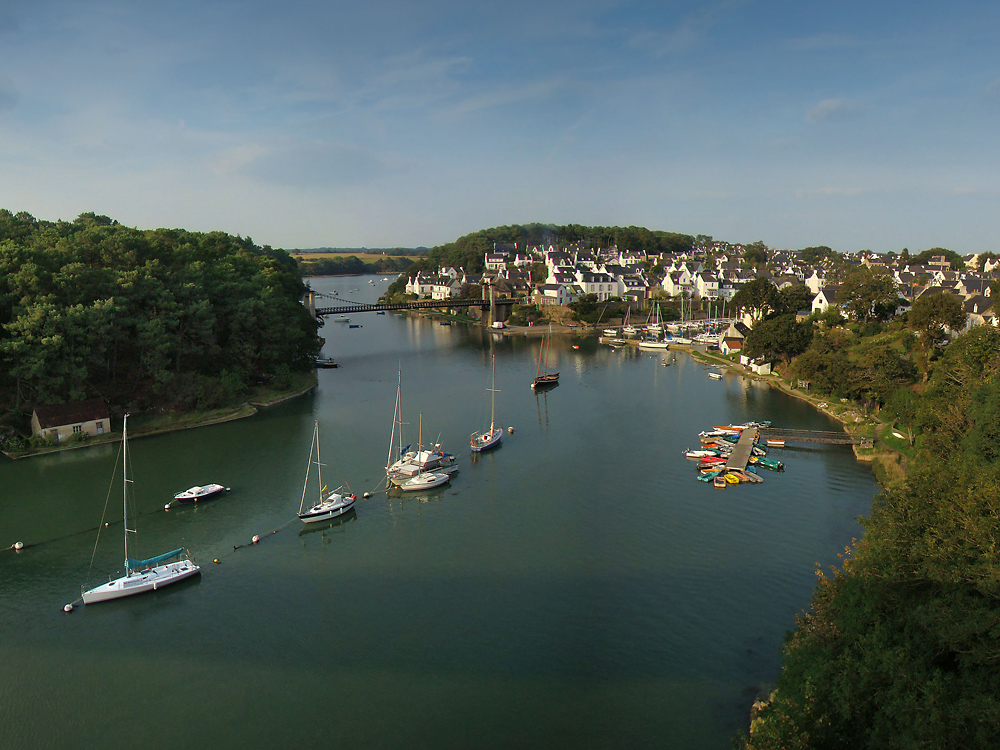 Le Bono, Morbihan, Bretagne, France.